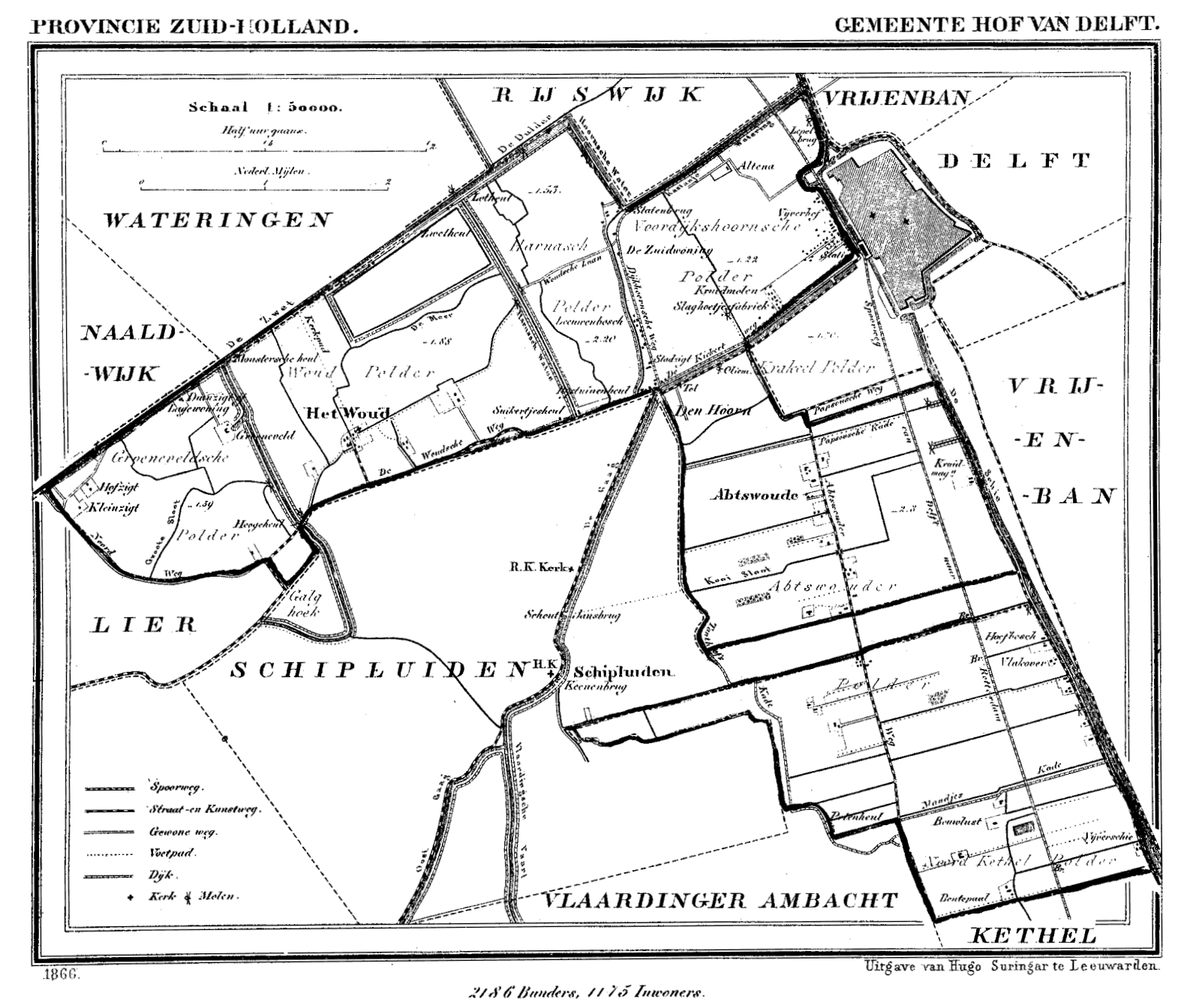 Kaart van Hof van Delft - dezelfde als de al bestaande Hofvandelft.gif, maar iets rechtgezet.